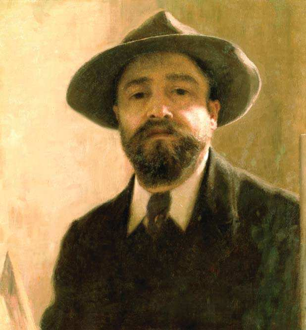 Arthur Coulin - Autoportret, 1910